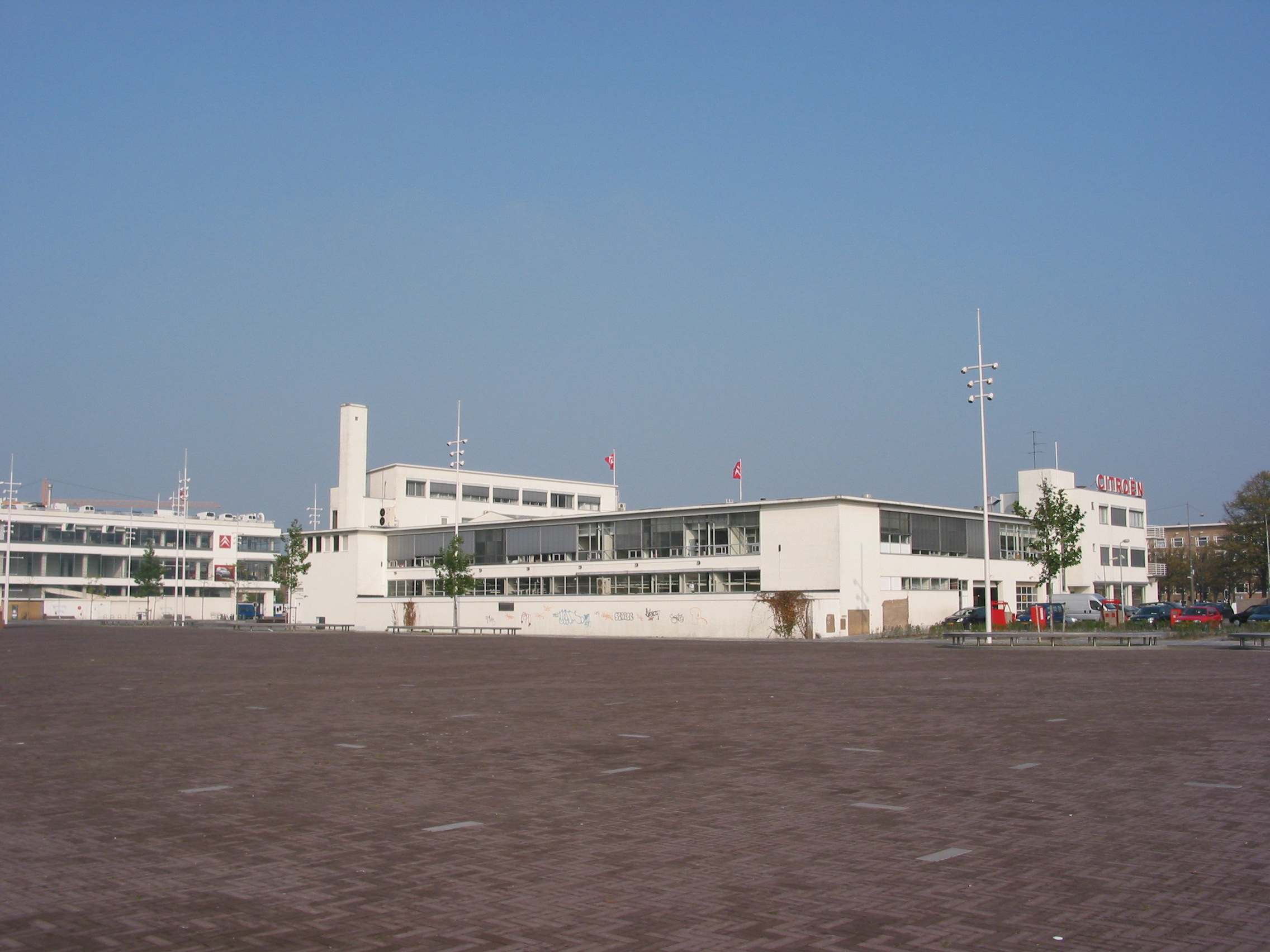 Citroen garage (back), Stadionplein, Amsterdam, architect Jan Wils